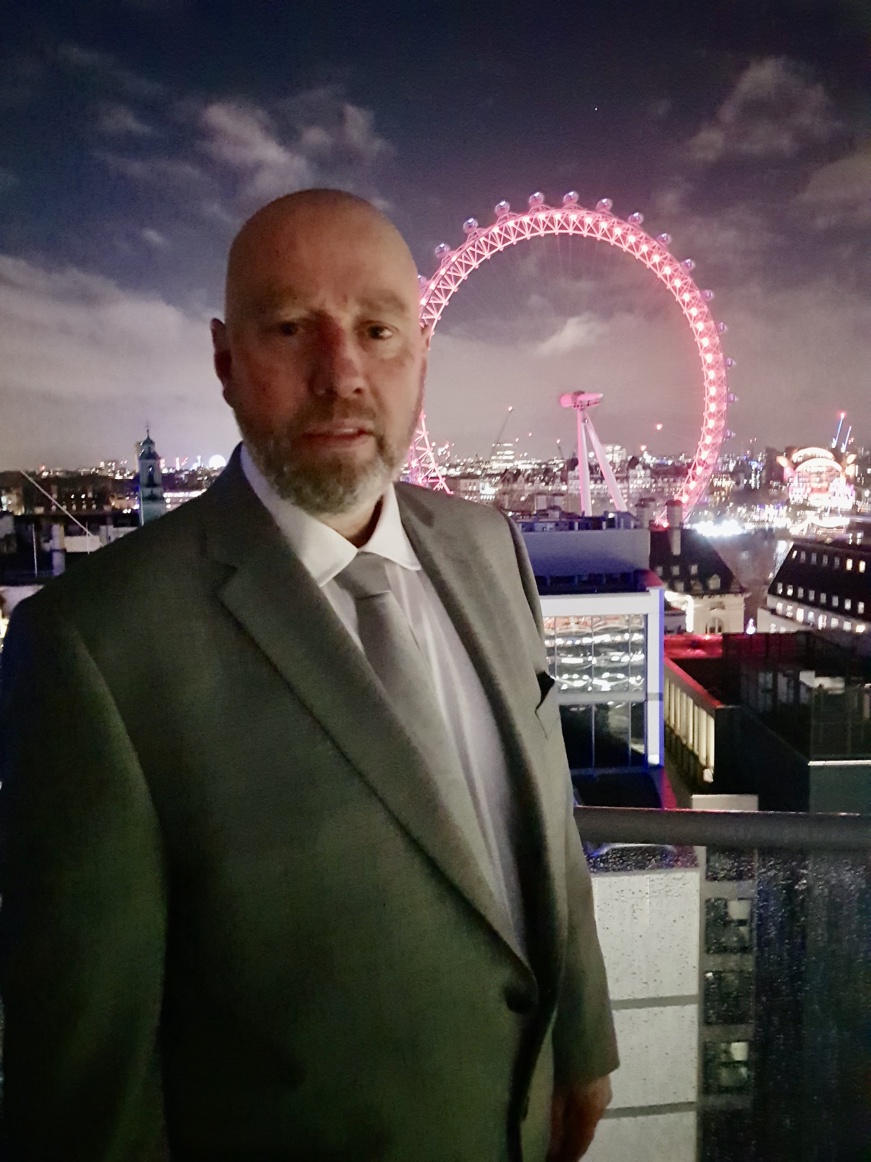 Jan Erik Mustad kommenterer valget i Storbritannia 2019